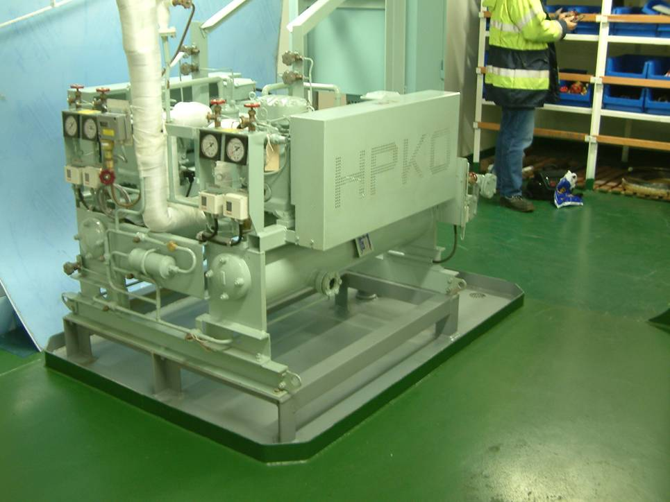 2 Verdichter und Kondensatoren der Proviantkälteanlage für ein Containerschiff